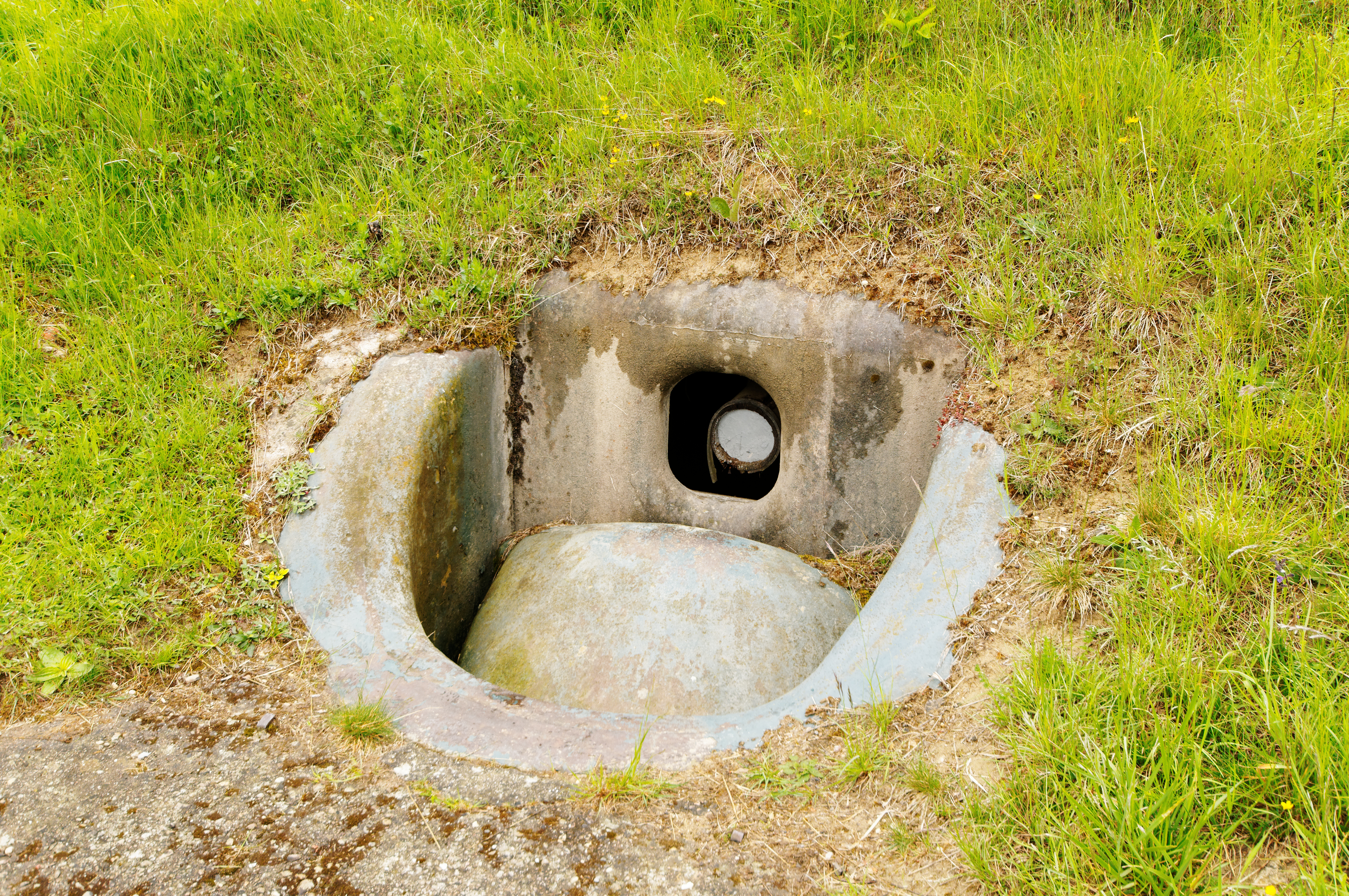 Fort du Mont Bart : verrou de la casemate Mougin.